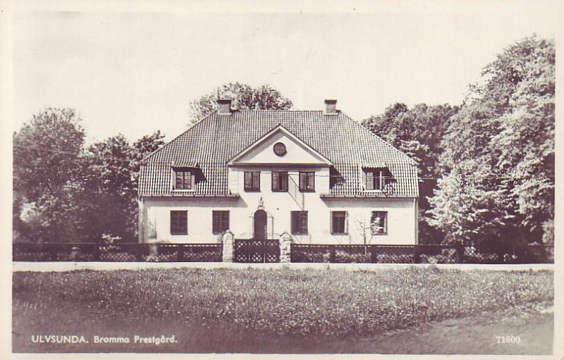 Ulvsunda prästgård i Bromma väster om Stockholm ligger på Lövåsvägen 12 i Ulvsunda. Villan byggdes 1914 och användes som boställe för Brommas präster 1914-1971.